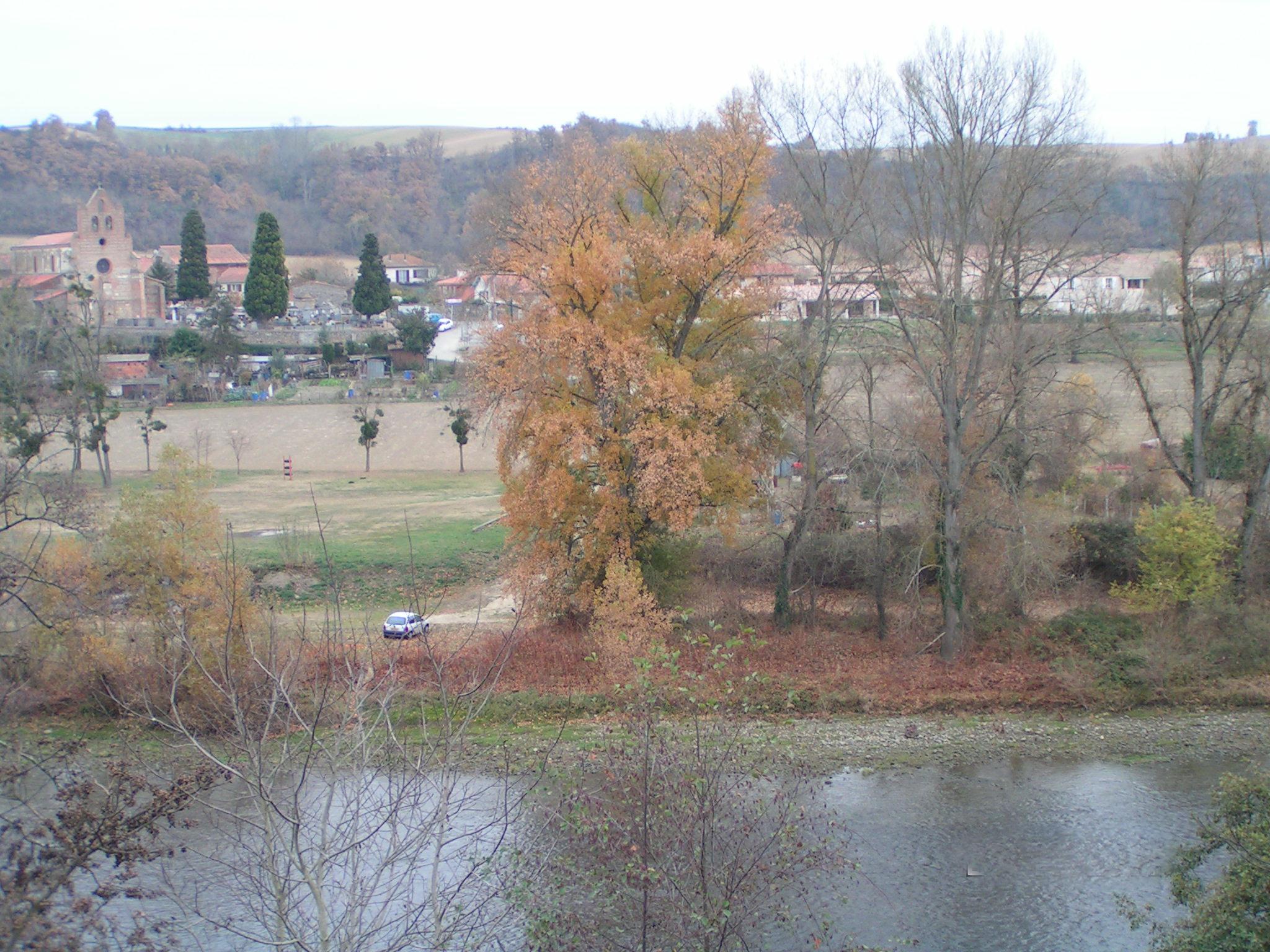 la Garonne et Capens